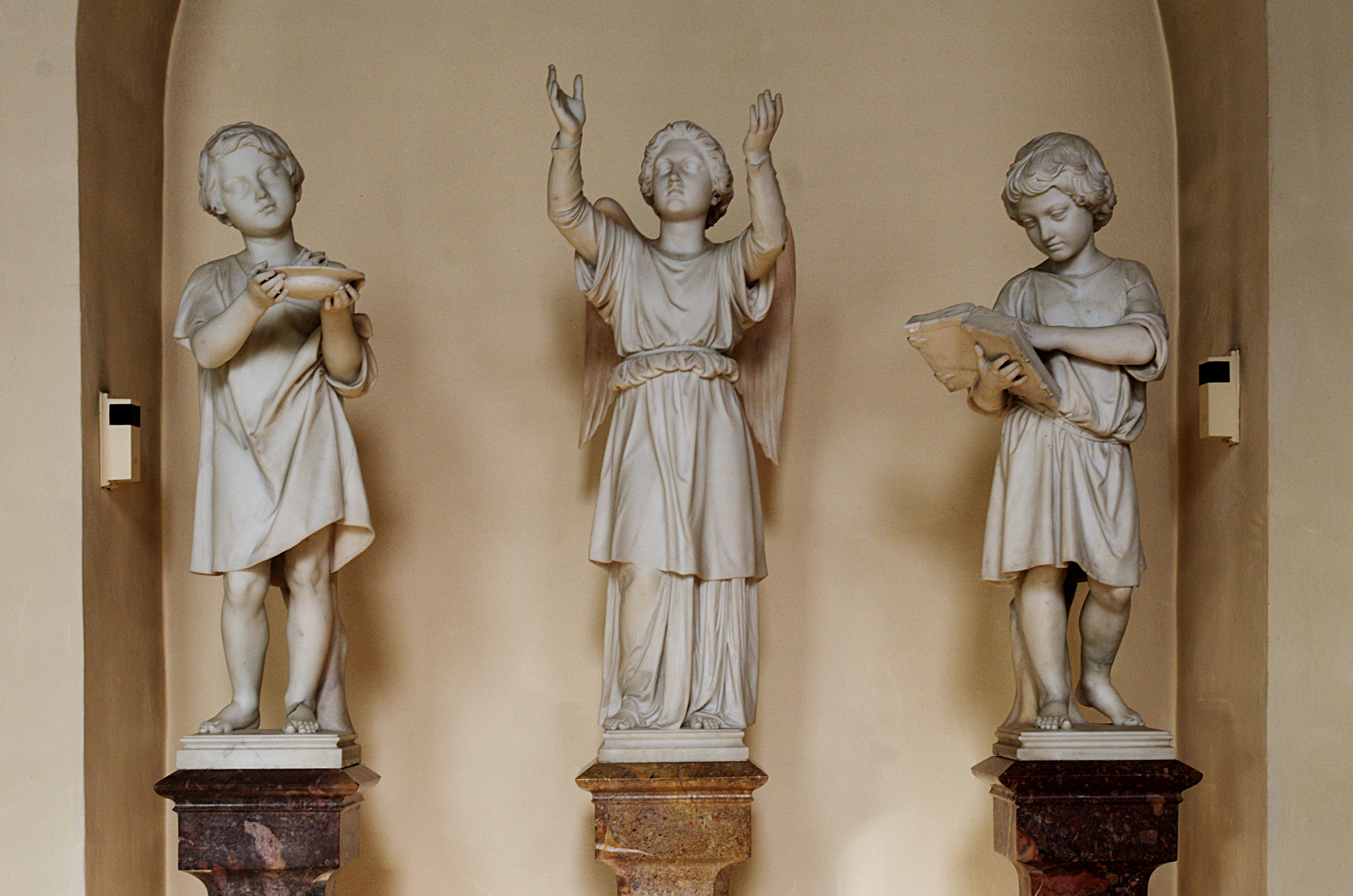 Bad Arolsen in Hessen.Die drei Figuren Stellen den Glauben, die Liebe und die Hoffung dar. Bildhauer war Christian Daniel Rauch.